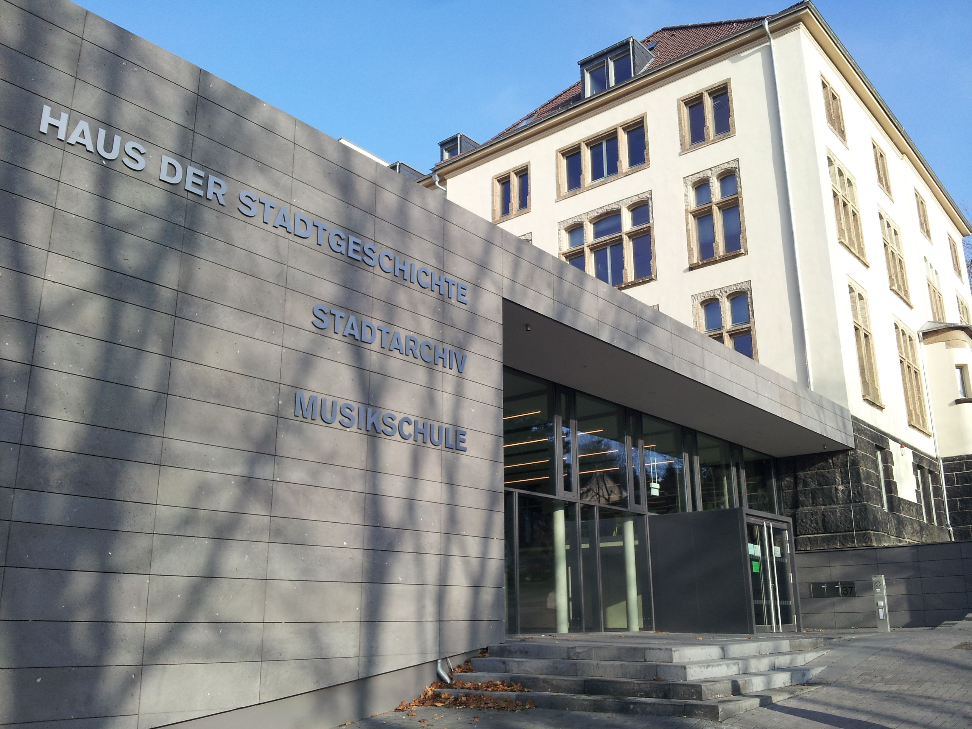 Haus der Stadtgeschichte/Stadtarchiv, Mülheim an der Ruhr (Fassade mit Schriftzug)